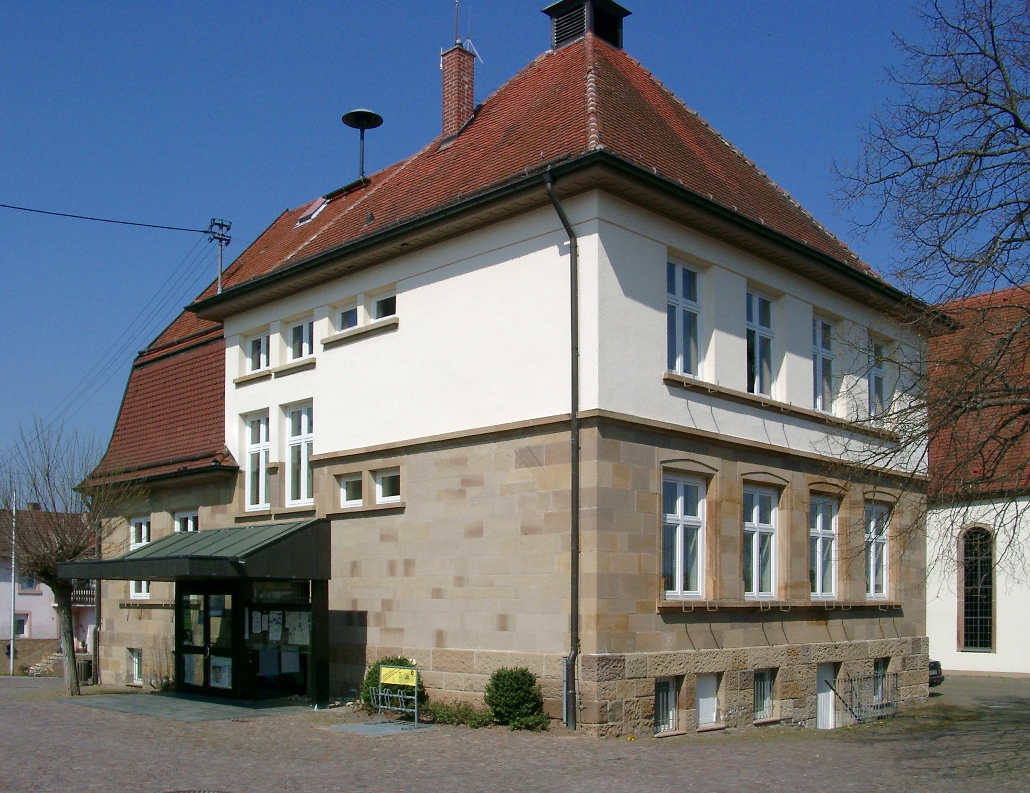 Zaberfeld, Rathaus